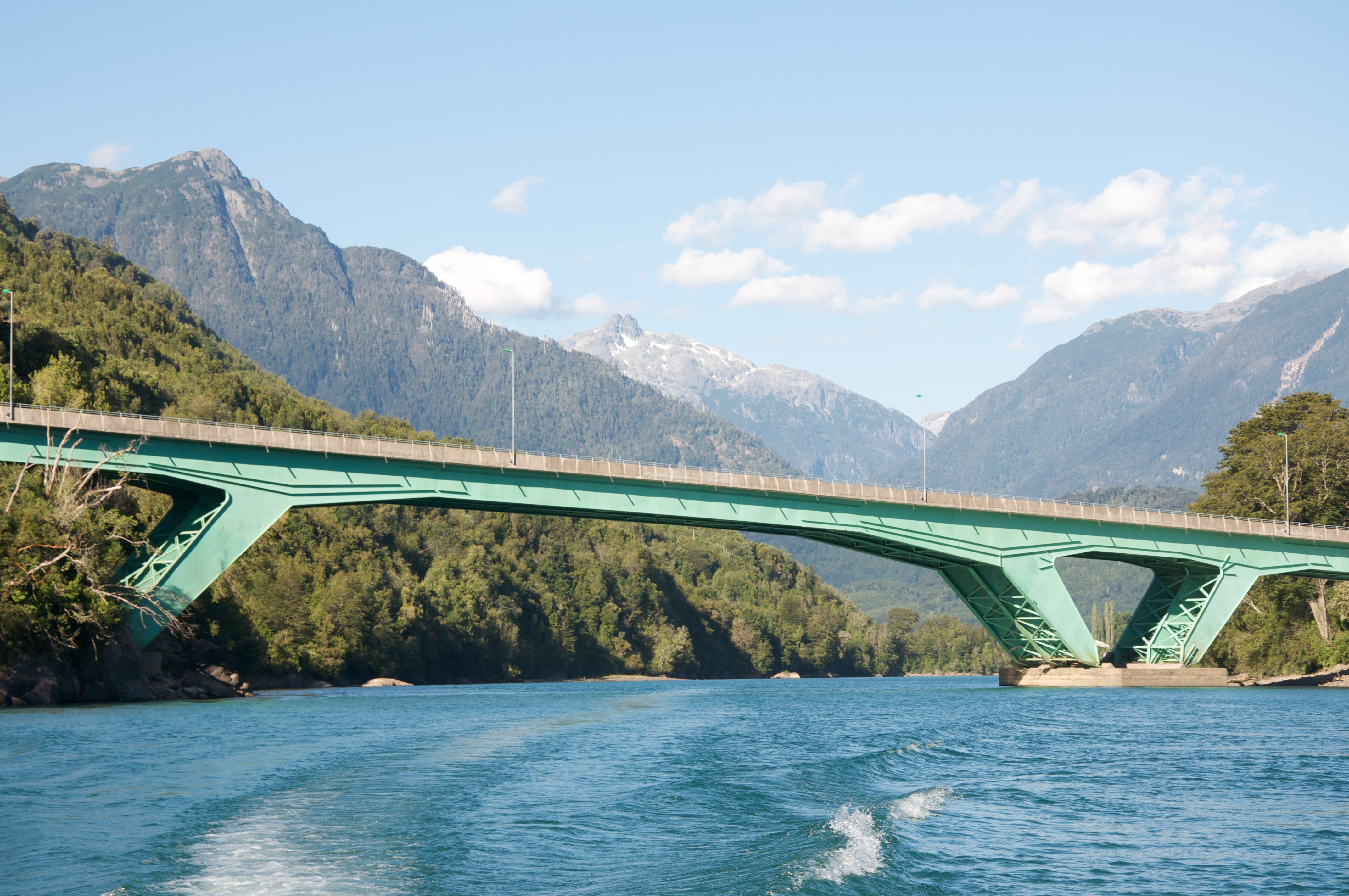 Puente de Río Puelo